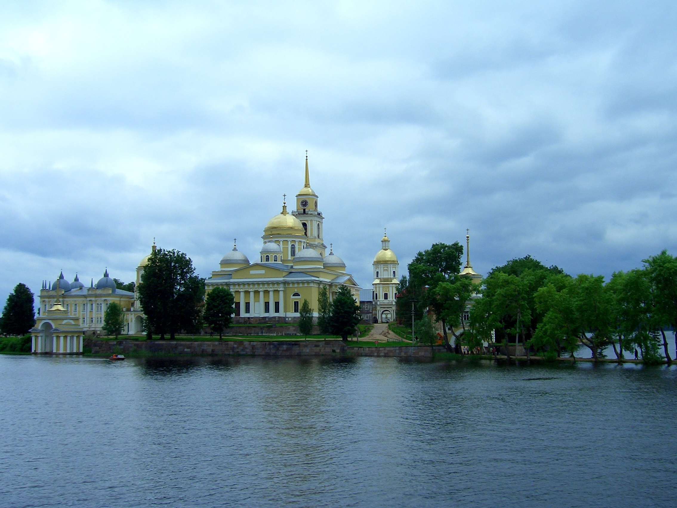 Монастырь Нилова пустынь: остров Столбной, Селигер, Осташковский район, Тверская область